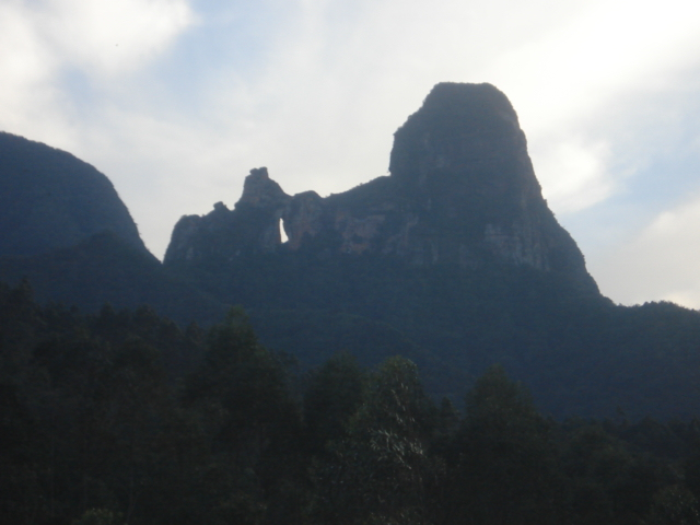 Foto Serra Furada vista de Grão Pará